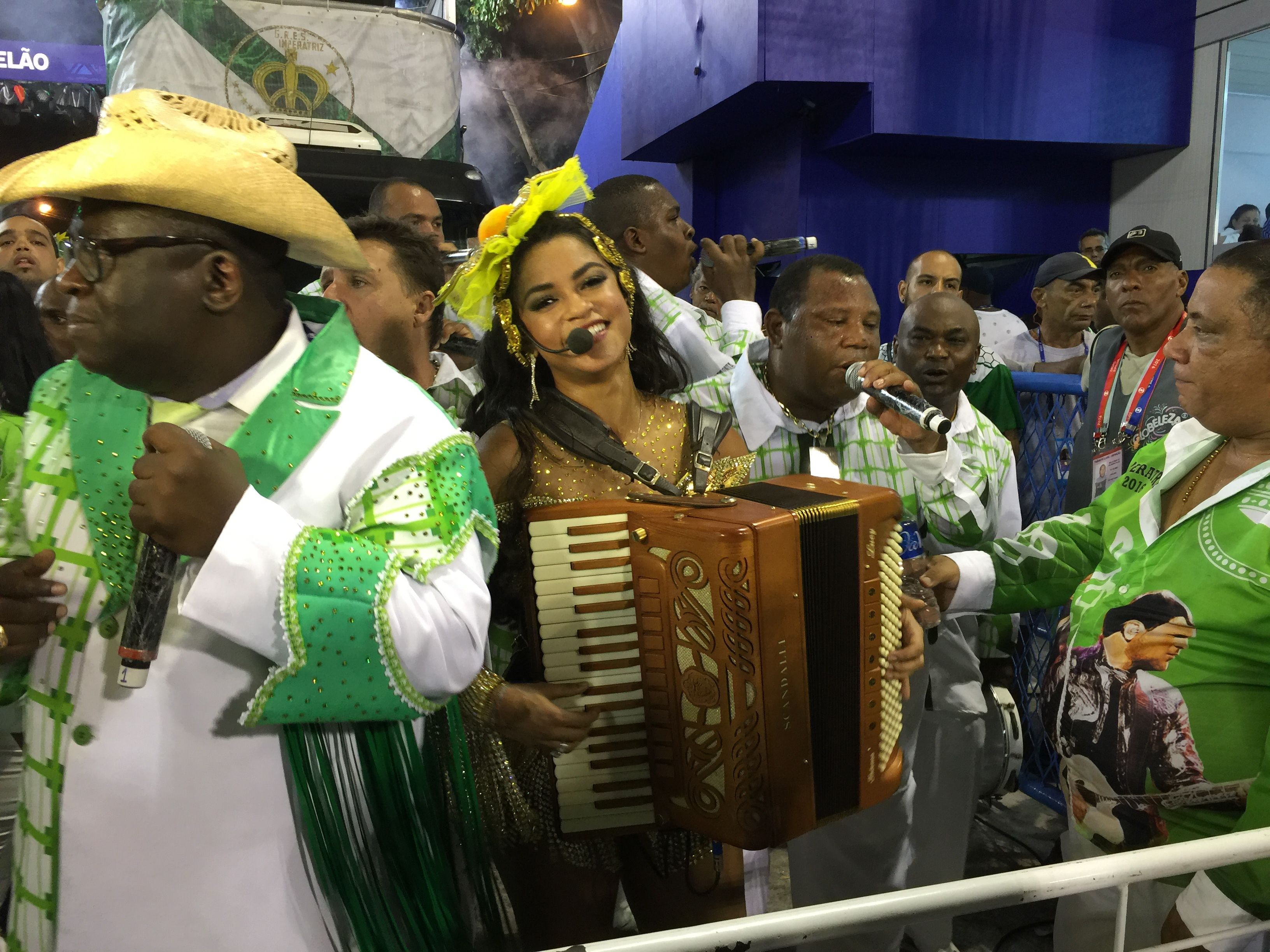 Rio de Janeiro -A cantora Lucy Alves participou do carro de som da Imperatriz Leopoldinense (Cristina Indio do Brasil/Agência Brasil)